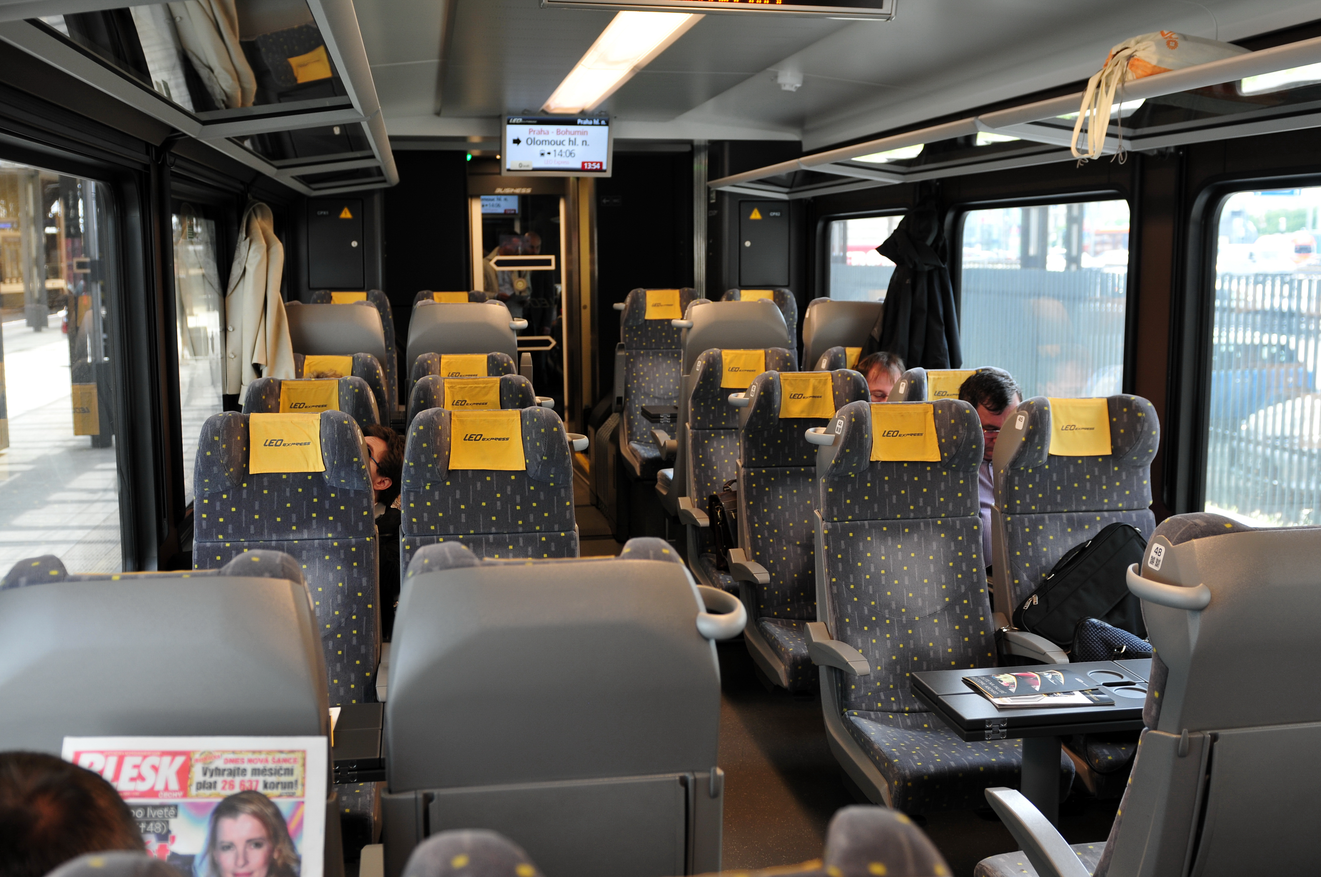 Praha hlavní nádraží